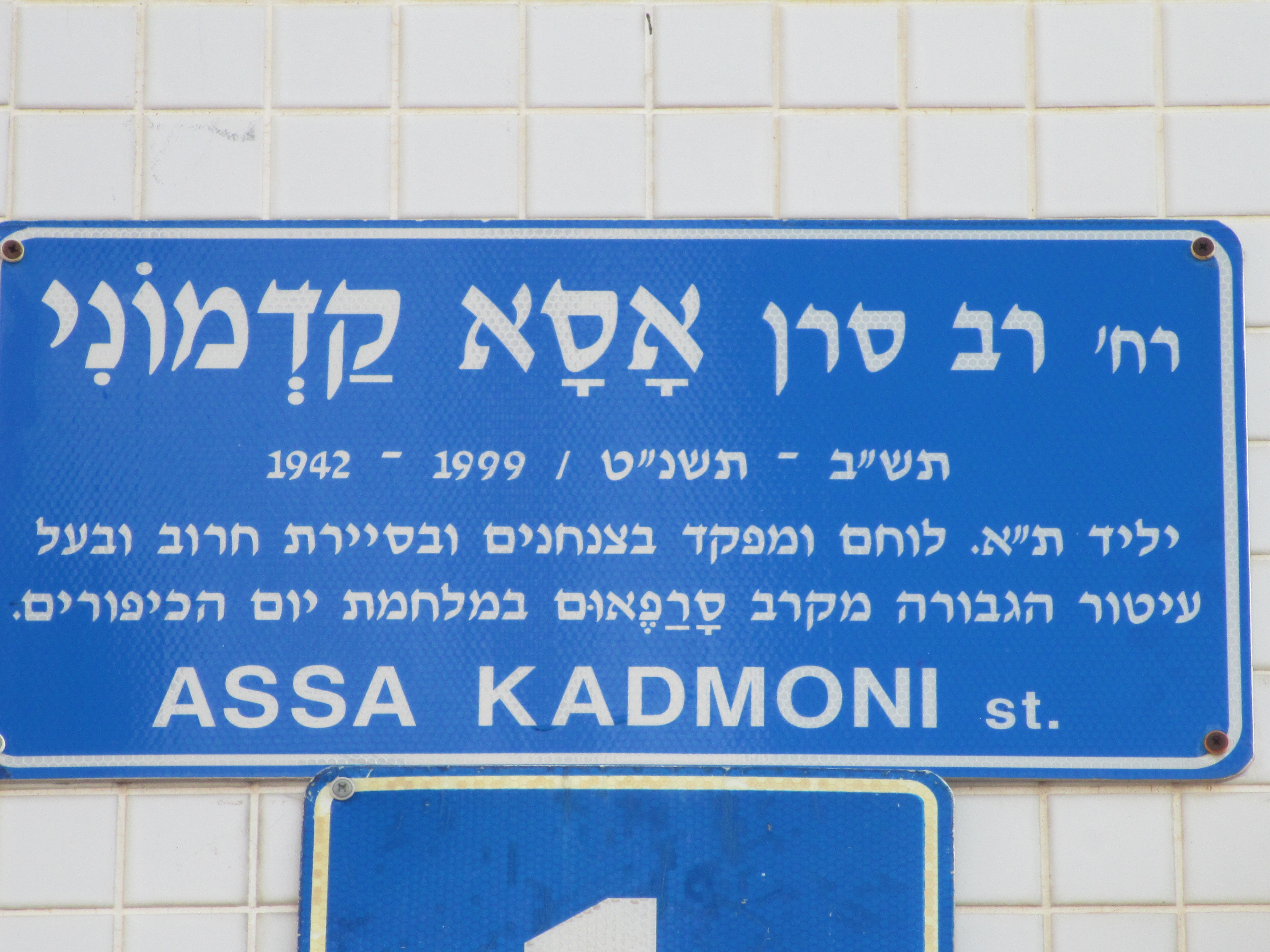 שלט רחוב אסא קדמוני בתל אביב